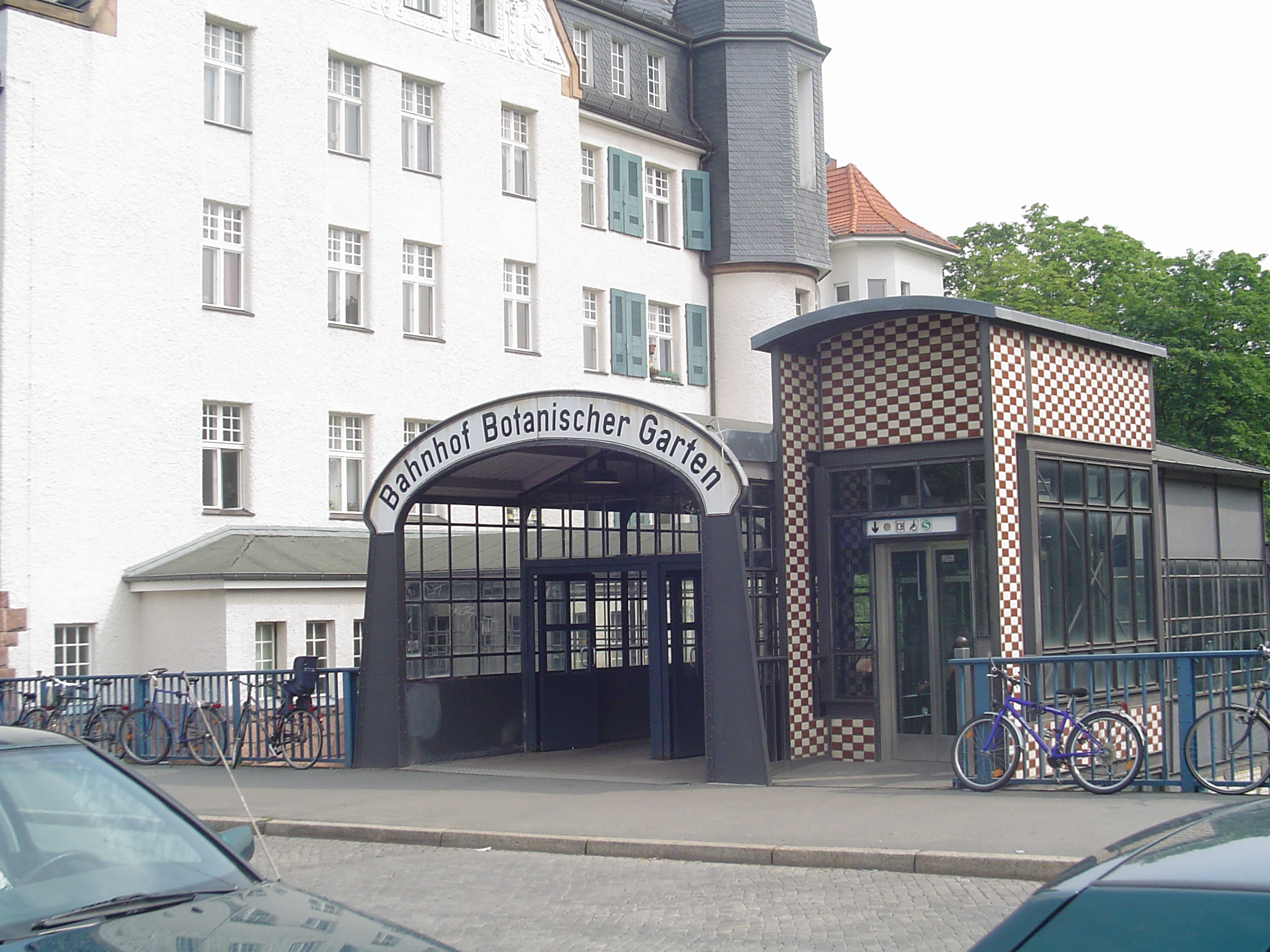 Berlin-Lichterfelde, S-Bahnhof Botanischer Garten, Standort auf der Brücke (Südwesten)